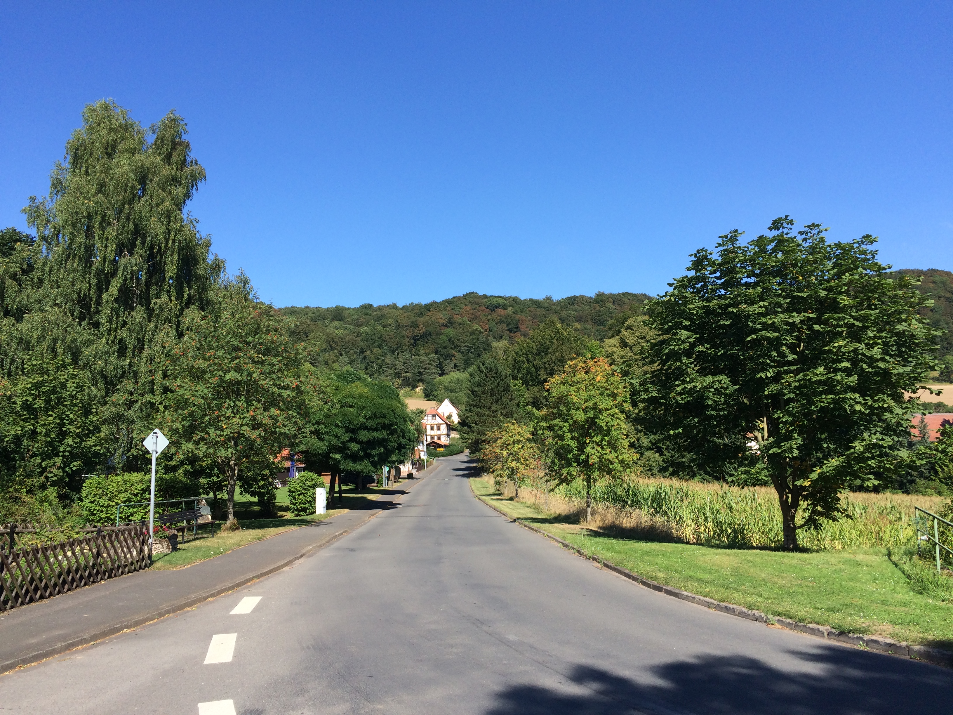 Die Brandenfelsstraße (Kreisstraße 20) in Markershausen (Herleshausen); Werra-Burgen-Steig Hessen (X5H)